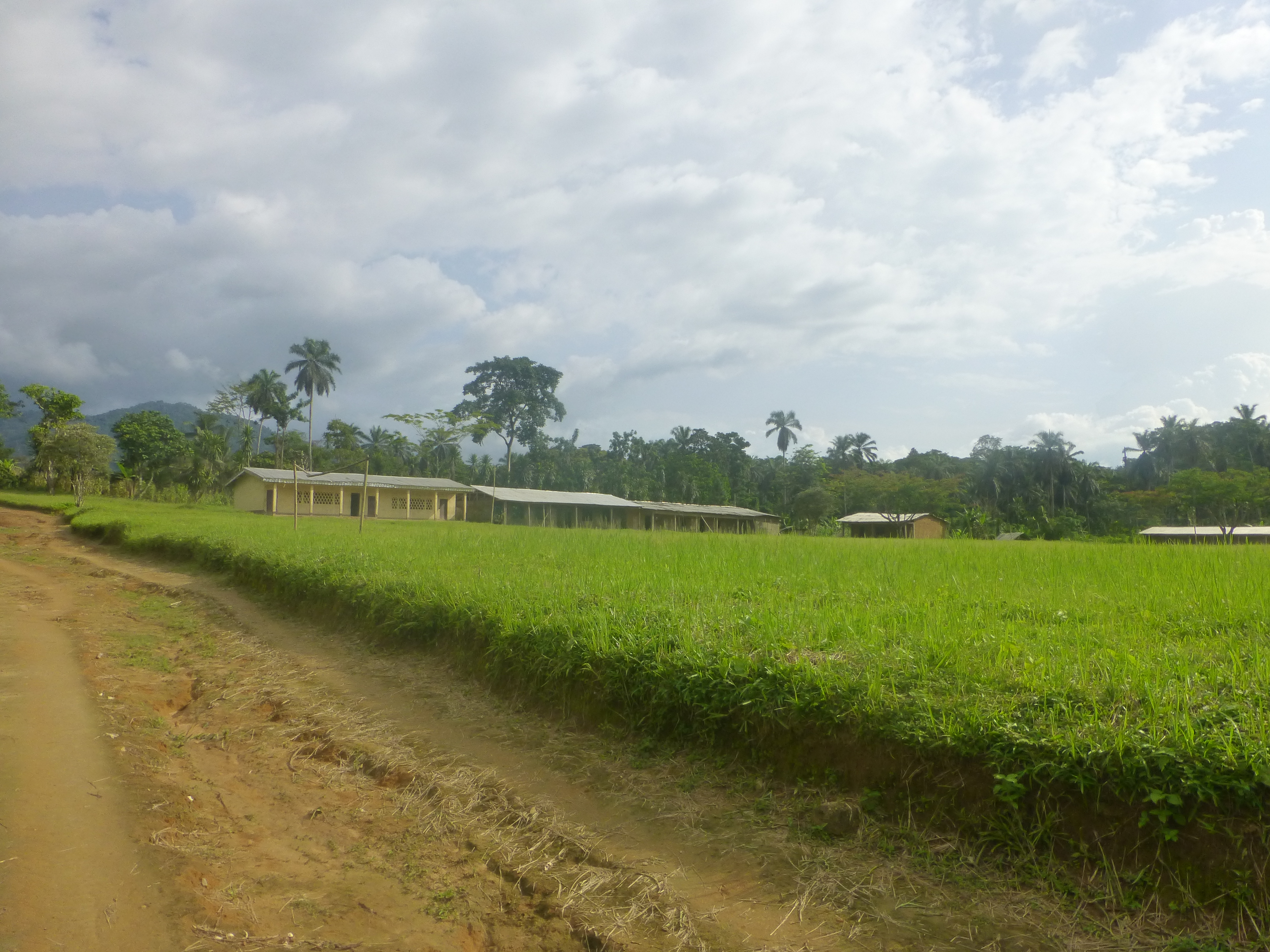 Sanctuaire de Bayang Mbo